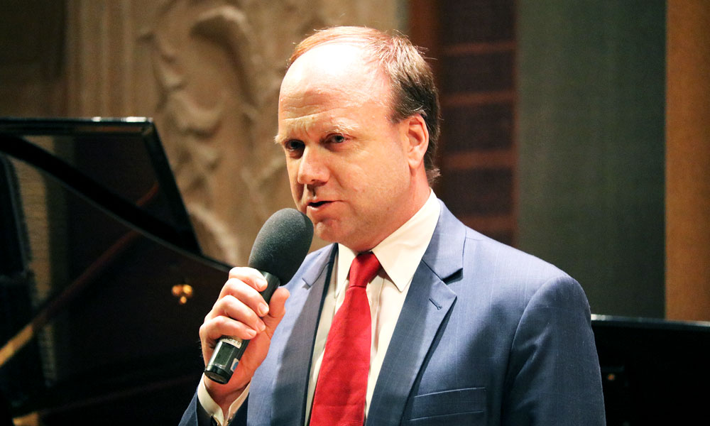 Fredrik Wetterqvist i Grünewaldsalen på Konserthuset Stockholm.